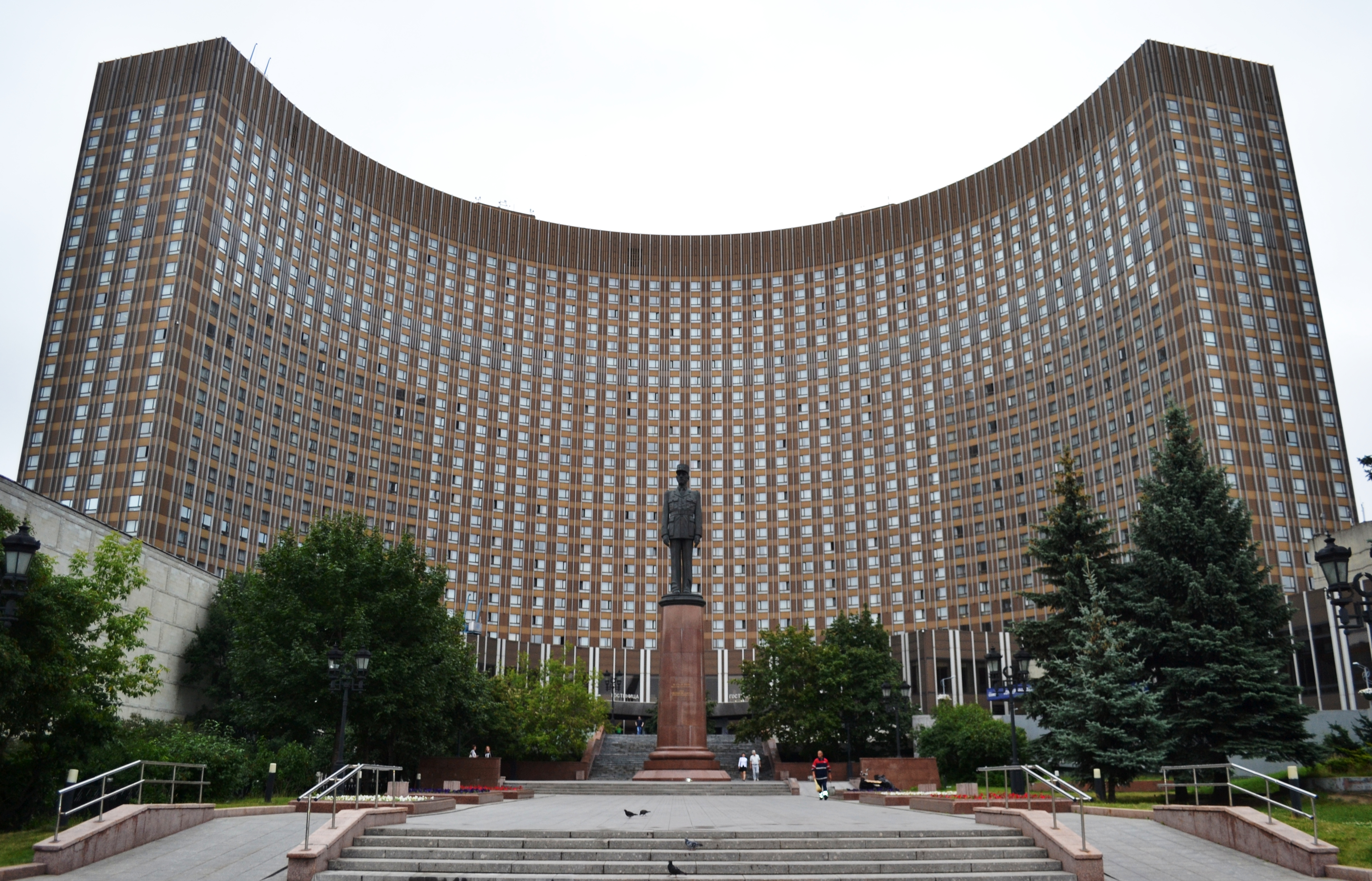 Шарль де Голль. июль 2016 г.